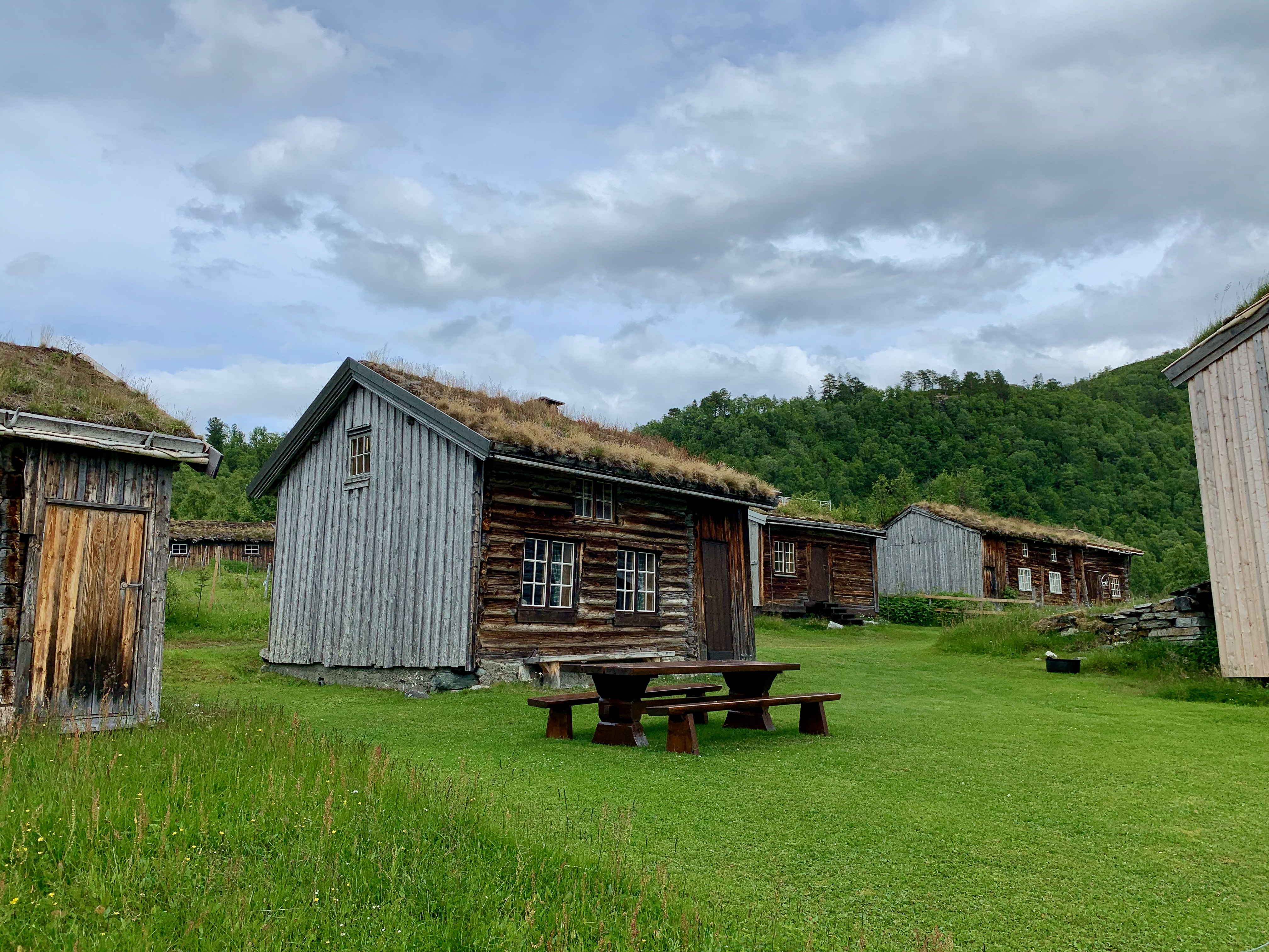 Fra Vålåskaret, Norges første fredede setergrend (1967).